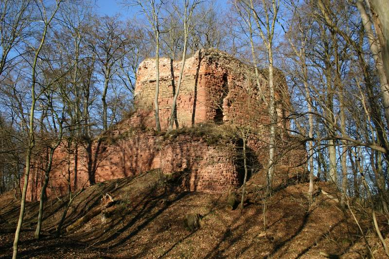 Grillenburg